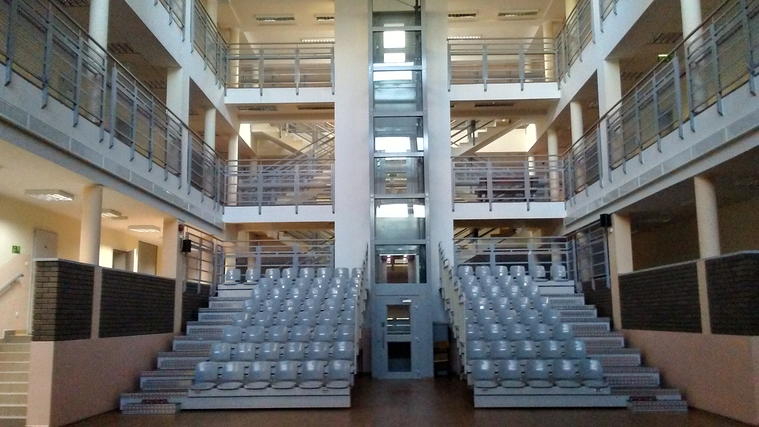 Tomaszów Mazowiecki w wojewódzwie łódzkim. Trybuny i antresole przed sceną teatralną w wybudowanej w drugiej połowie lat dziesiątych XXI wieku auli ZSP1 „Mechanika”, PL, EU. CC0